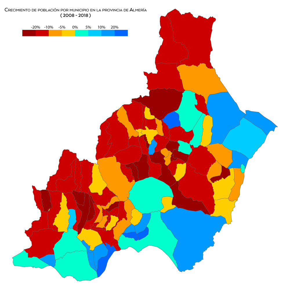 Crecimiento de la población por municipio en la provincia de Almería entre los años 1998 y 2008